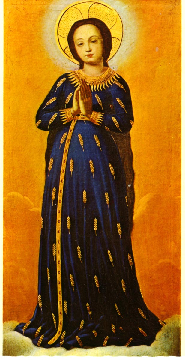 Salzburg, Stiftskirche St. Peter, Maria im Ährenkleid, 14. Jh. (mit späterem Rahmen)